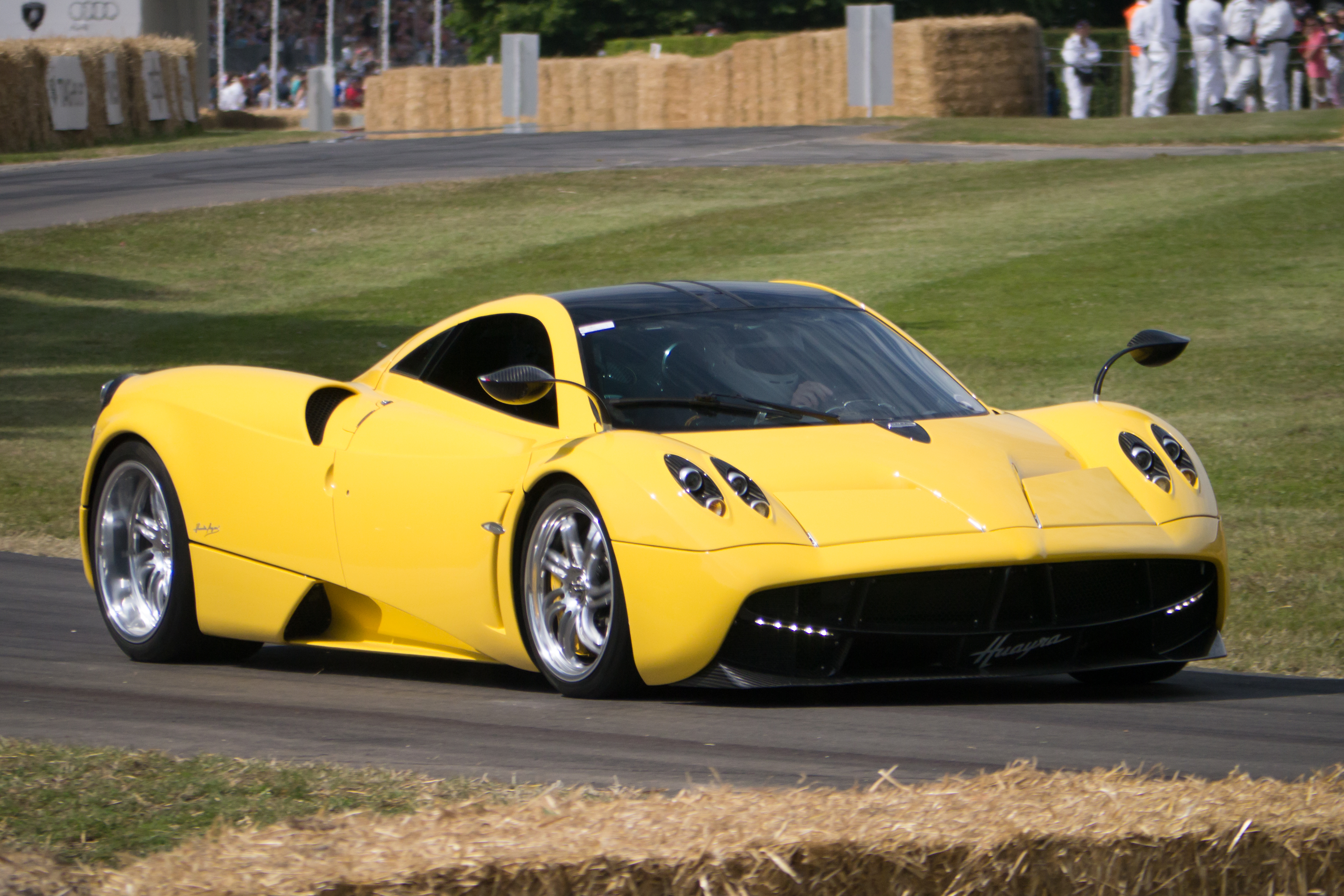 2015 Pagani Huayra